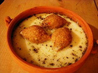 մածնապուրի մեջ եփած մսով կոլոլակ